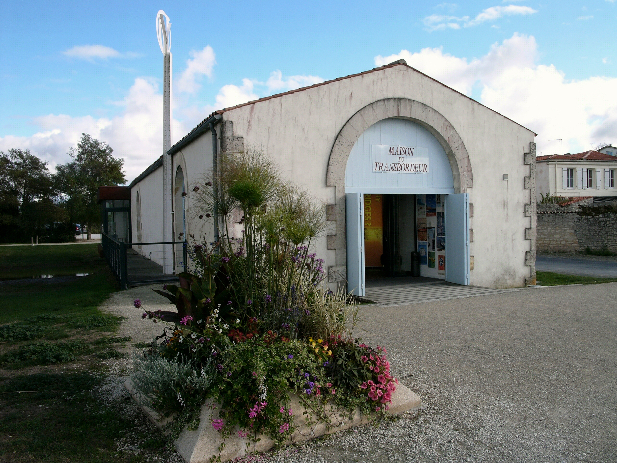 Maison du pont transbordeur Echillais Charente Maritime France